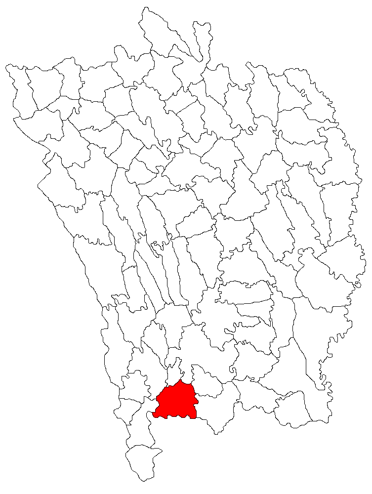 Categorie:Hărţi ale judeţului Vaslui